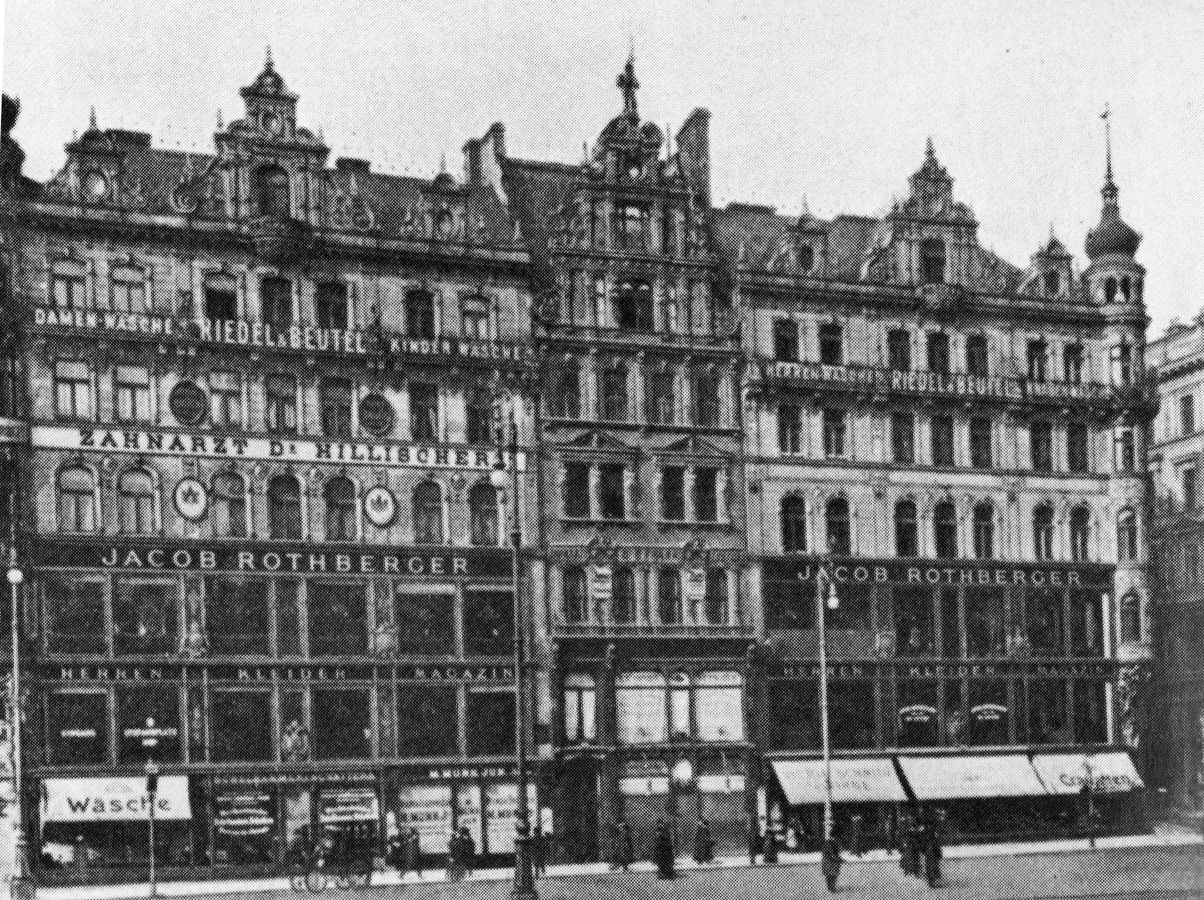 Wien, Stephansplatz, Warenhäuser Rothberger